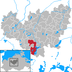 Krakow am See in Mecklenburg-Vorpommern - District Güstrow